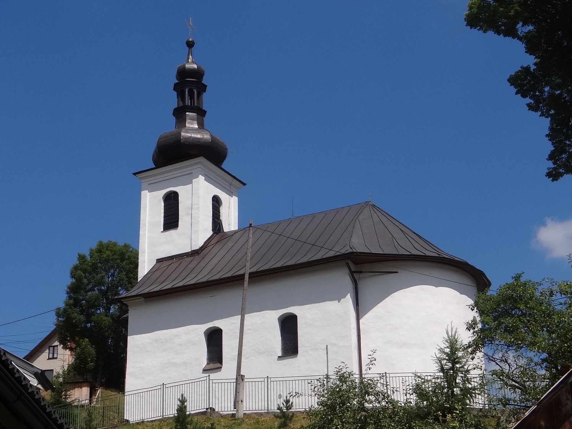 Habovka kostol (kościół katolicki w Habovce)